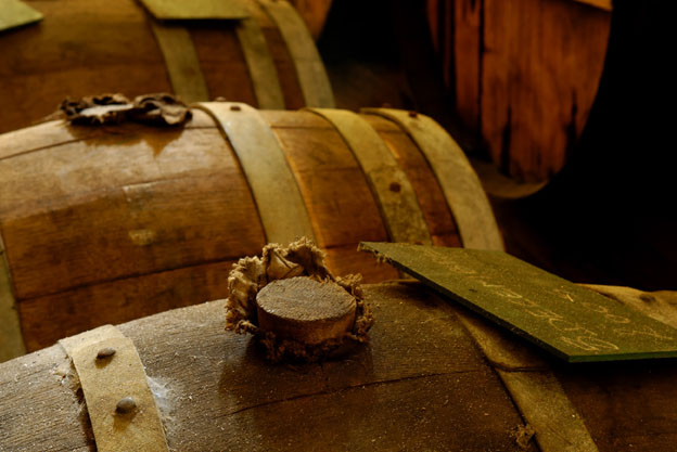 Savanna, La Réunion, petit fût de chêne dans le chais